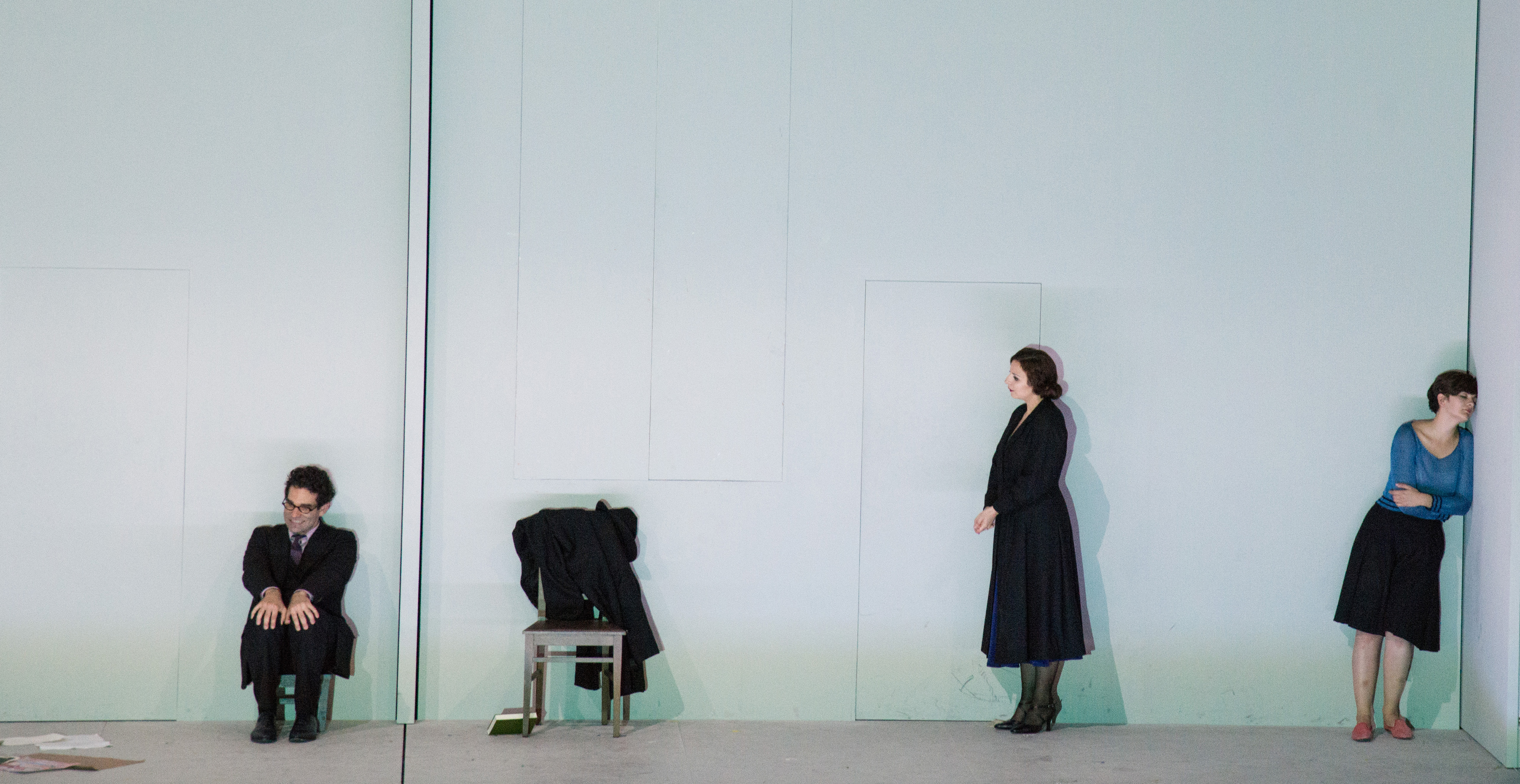 Charlotte Salomon, opera by Marc-André Dalbavie, Salzburg Festival, 2014